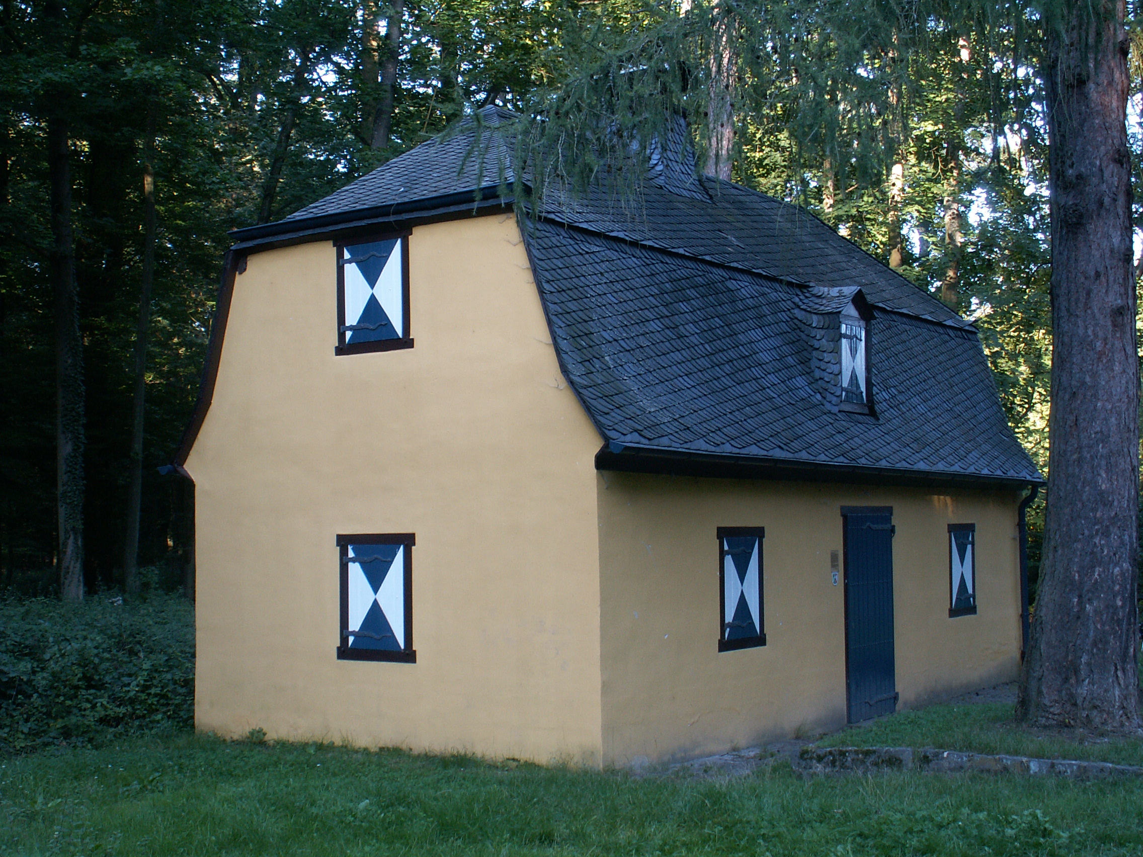 Jägerhäuschen, Kottenforst-Ville, bei Bonn (Ortsteil Röttgen).